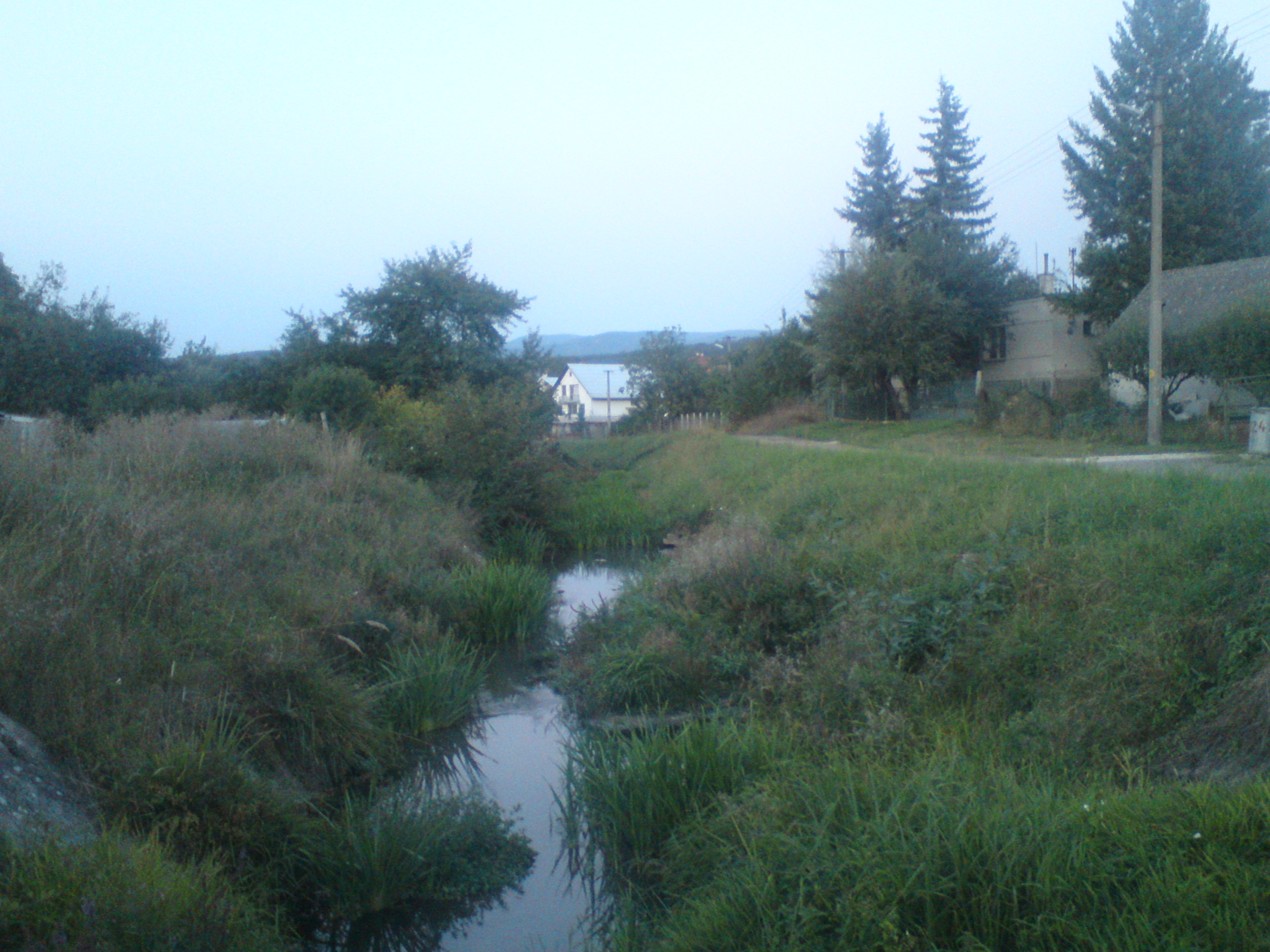 Potok Drndava v Kolačne